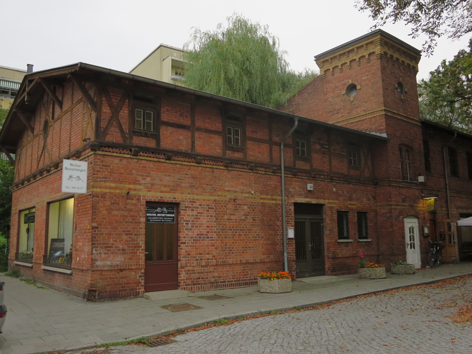 Berlin-Buch, Alt-Buch 38A (Ausspanne)